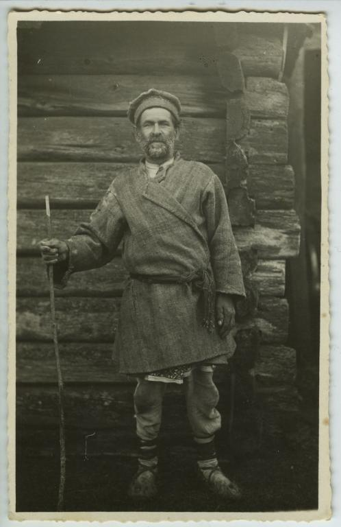 Класичний поліщук